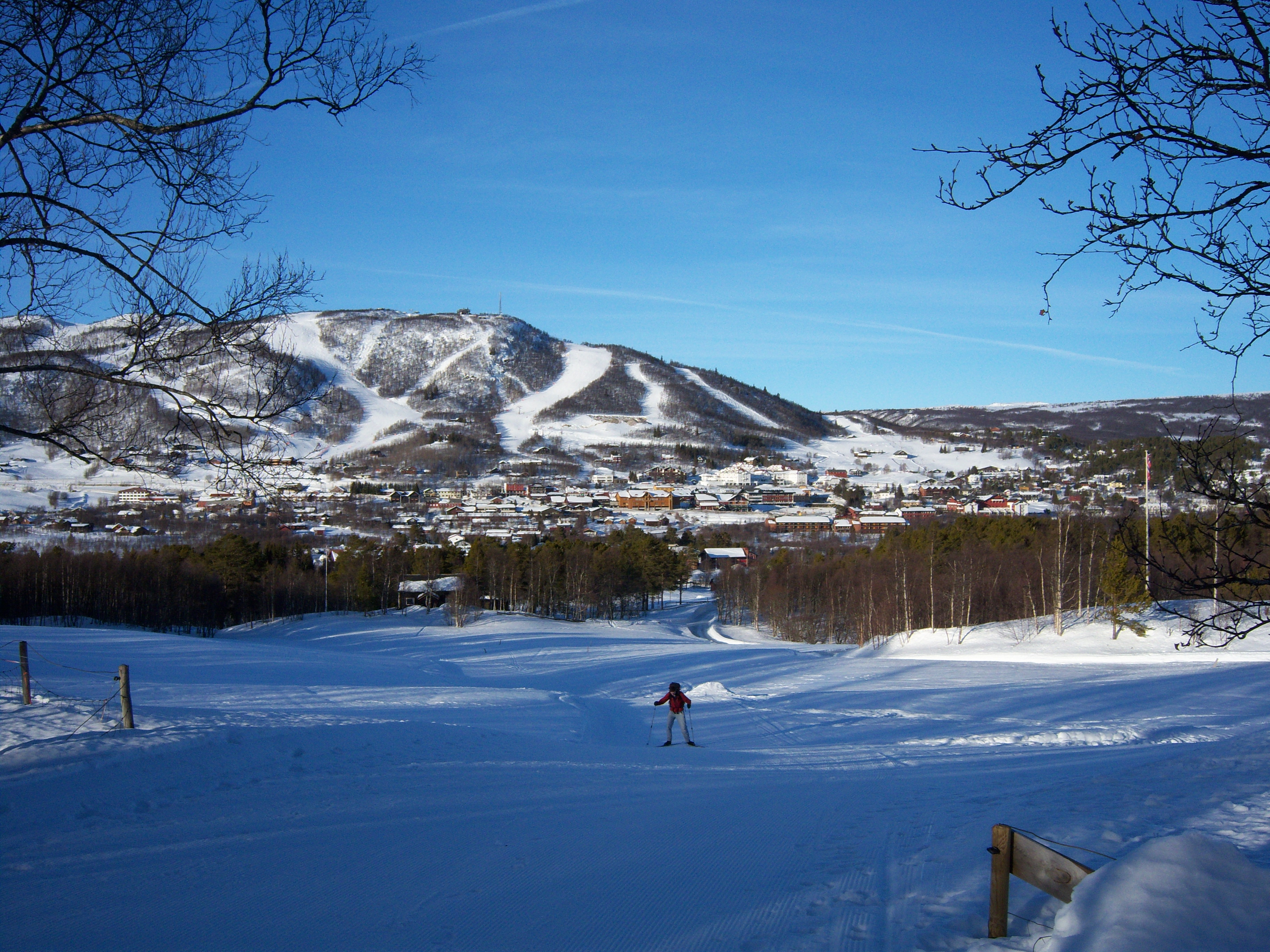 Geilo